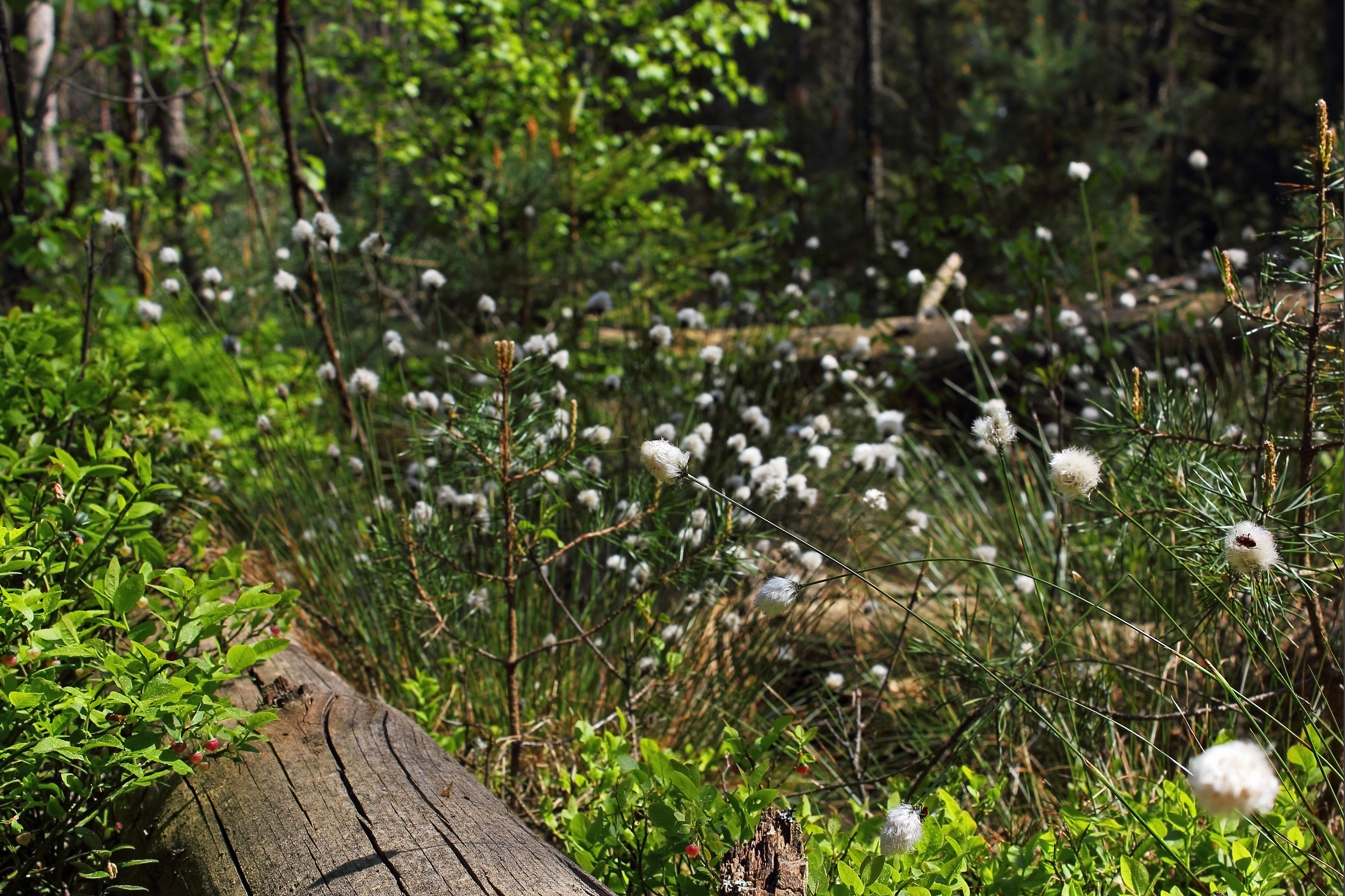 Das Rottalmoos liegt südwestlich von Litschau auf rund 542 Meter Seehöhe und erstreckt sich über eine Fläche von 10,86 Hektar. In dem seit 1999 zum Naturschutzgebiet erklärten Hochmoor wachsen viele gefährdete Pflanzen, etwa der Sumpfporst. This media shows the nature reserve in Lower Austria with the ID 46.